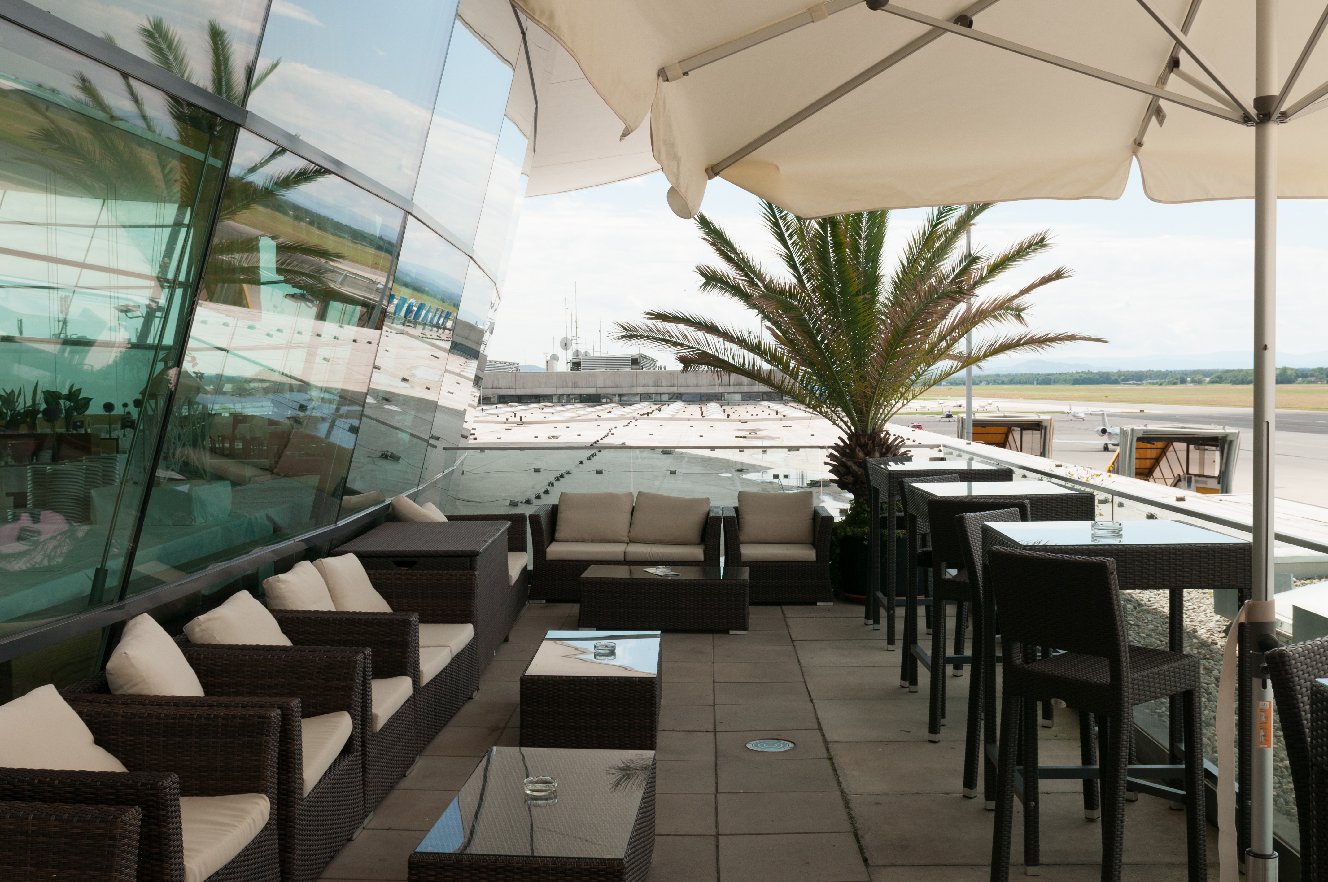 Flughafen Graz